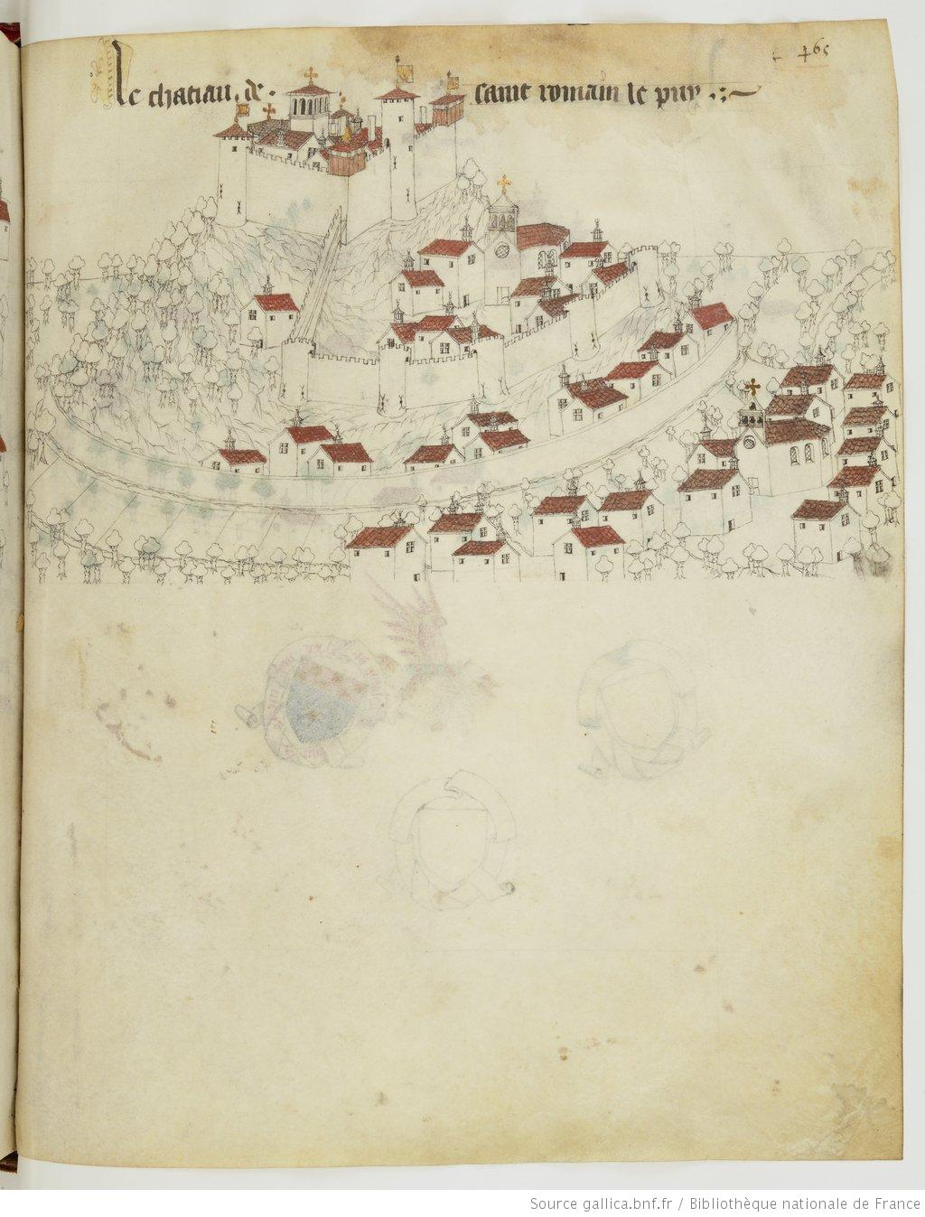 Château de Saint-Romain-Le-Puy (42, Fr.)